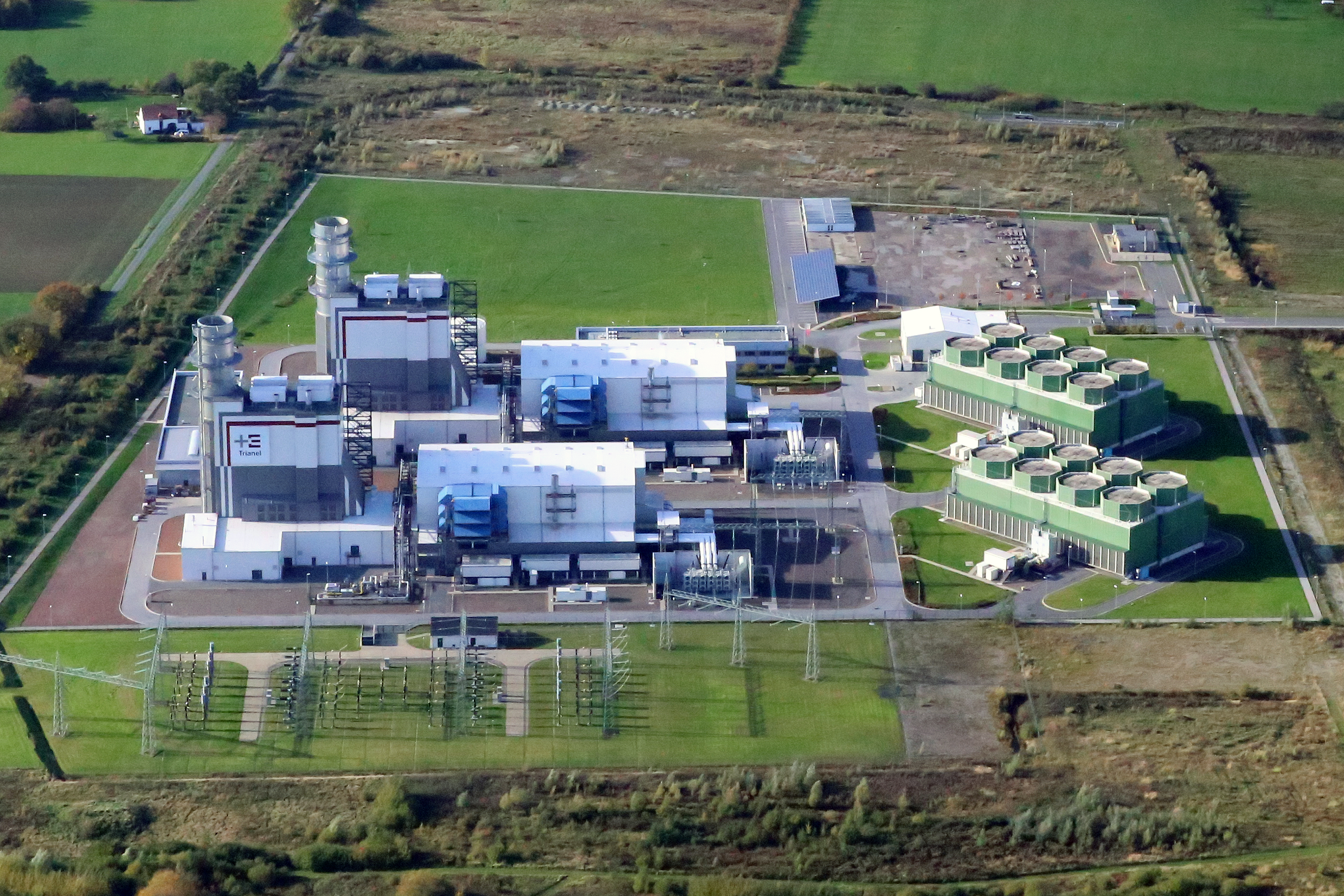 Luftbild Trianel Power Kraftwerk Hamm Hamm-Uentrop 2013, unten 380-kV-Schaltanlage Geithe